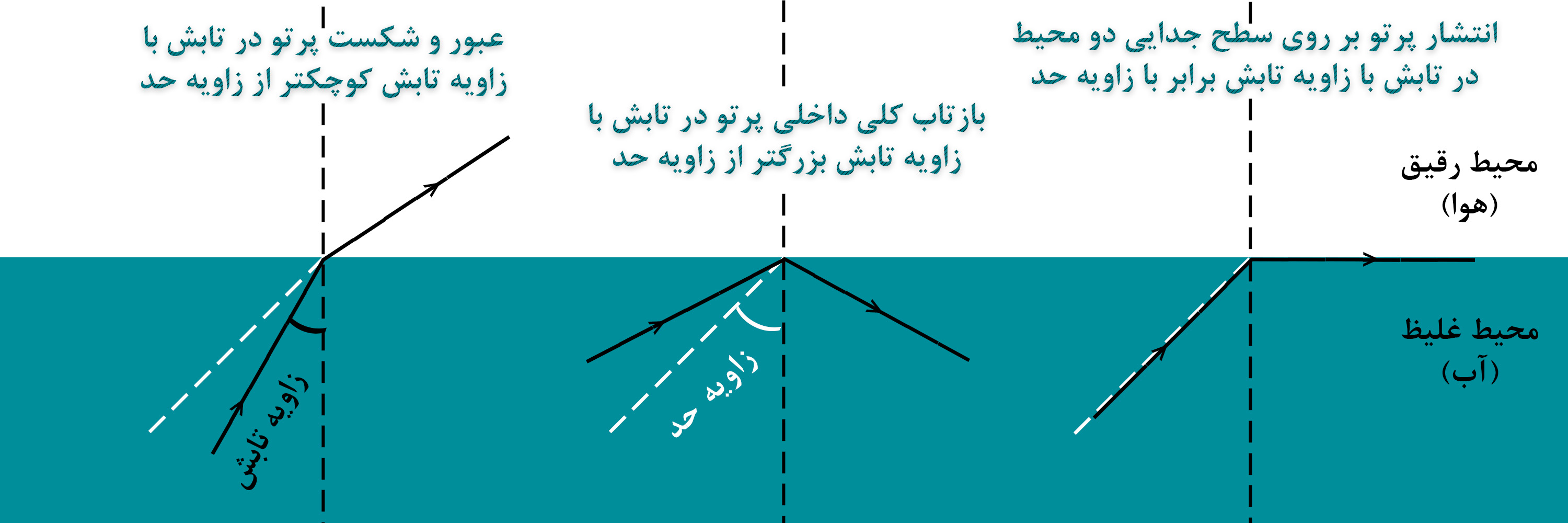 زاویه تابش در هنگام تابش پرتو به سطح جدایی دو محیط با ضرایب شکست متفاوت می تواند تعیین کننده ی عبور همراه با شکست، بازتاب کلی یا انتشار پرتو در سطح جدایی دو محیط باشد.